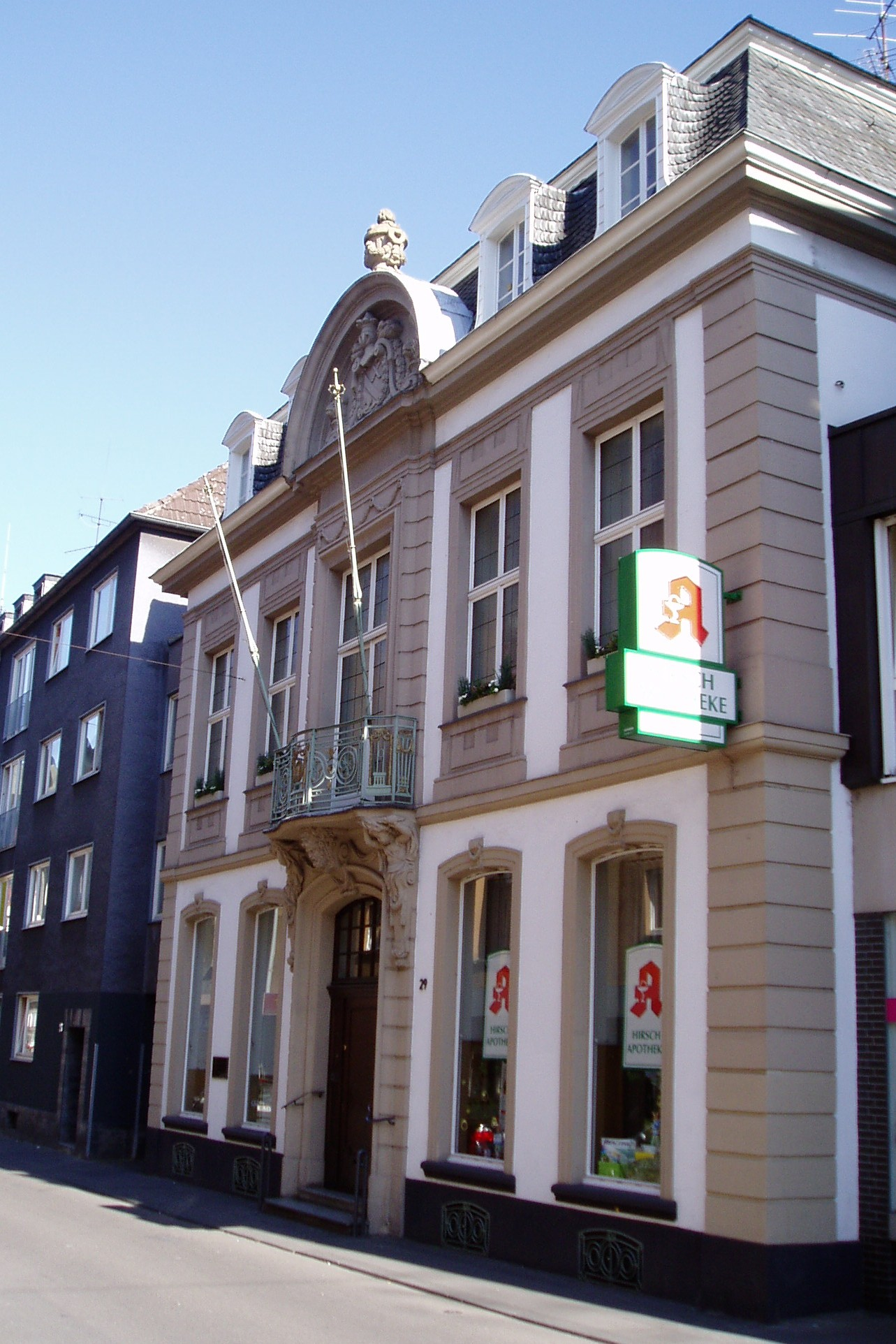 Köln-Mülheim, Haus Bertoldi Buchheimer Str. 29